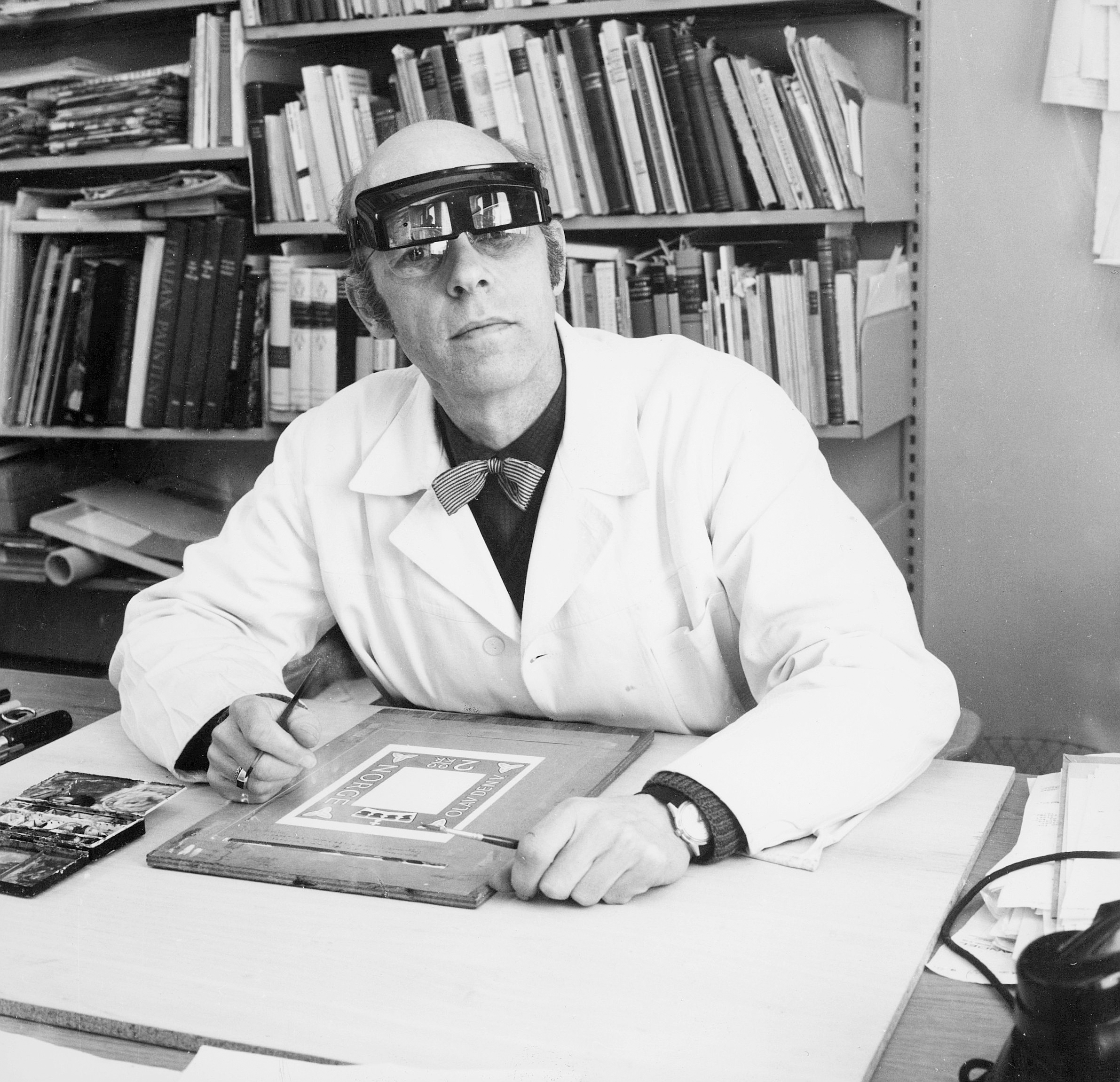 Frimerkekunstneren, professor Arne E. Holm, tegner utkast til frimerke NK 643 (portrett av kong Olav)